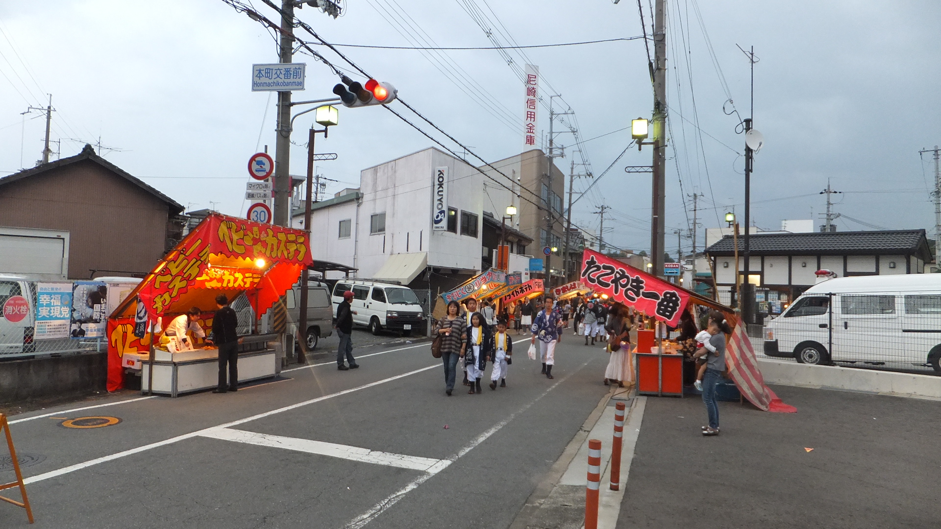 兵庫県三木市本町3丁目